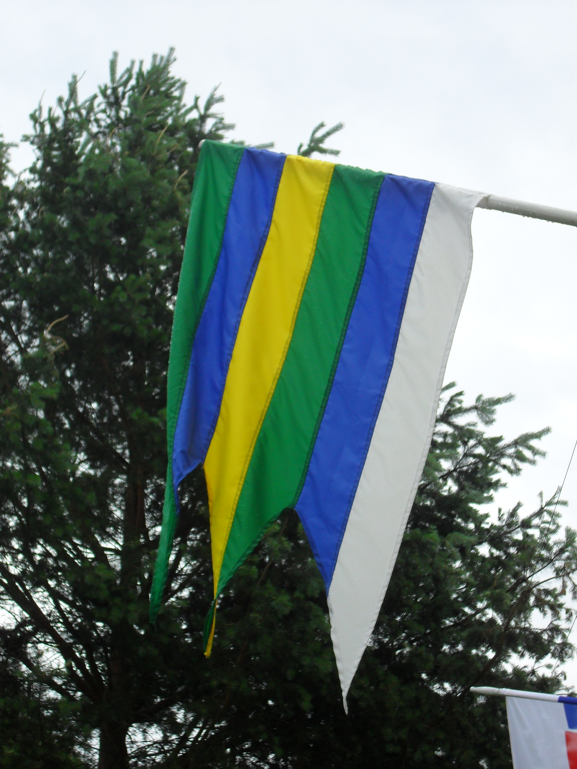 Gice - községi zászló